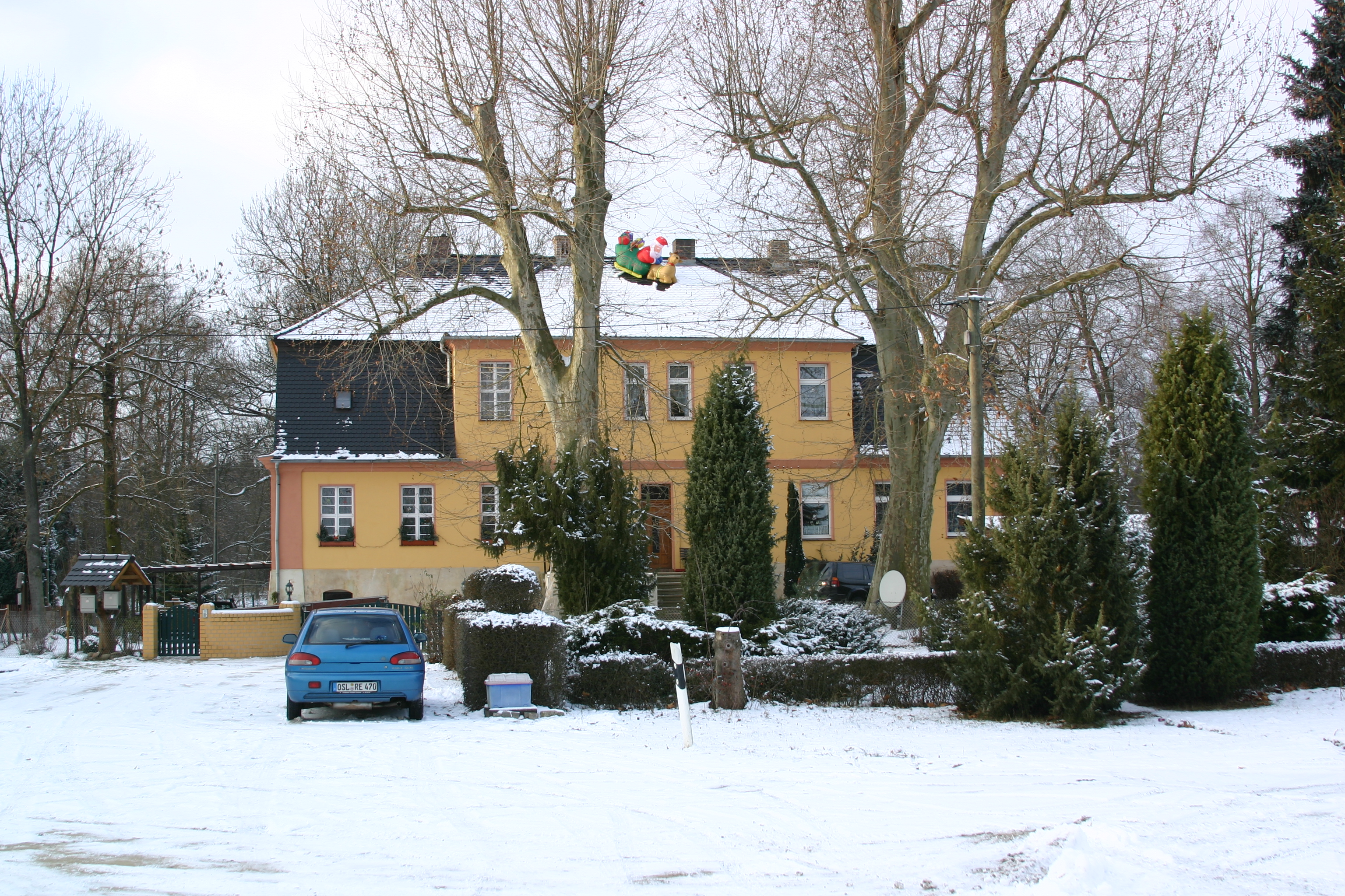 Gutshaus